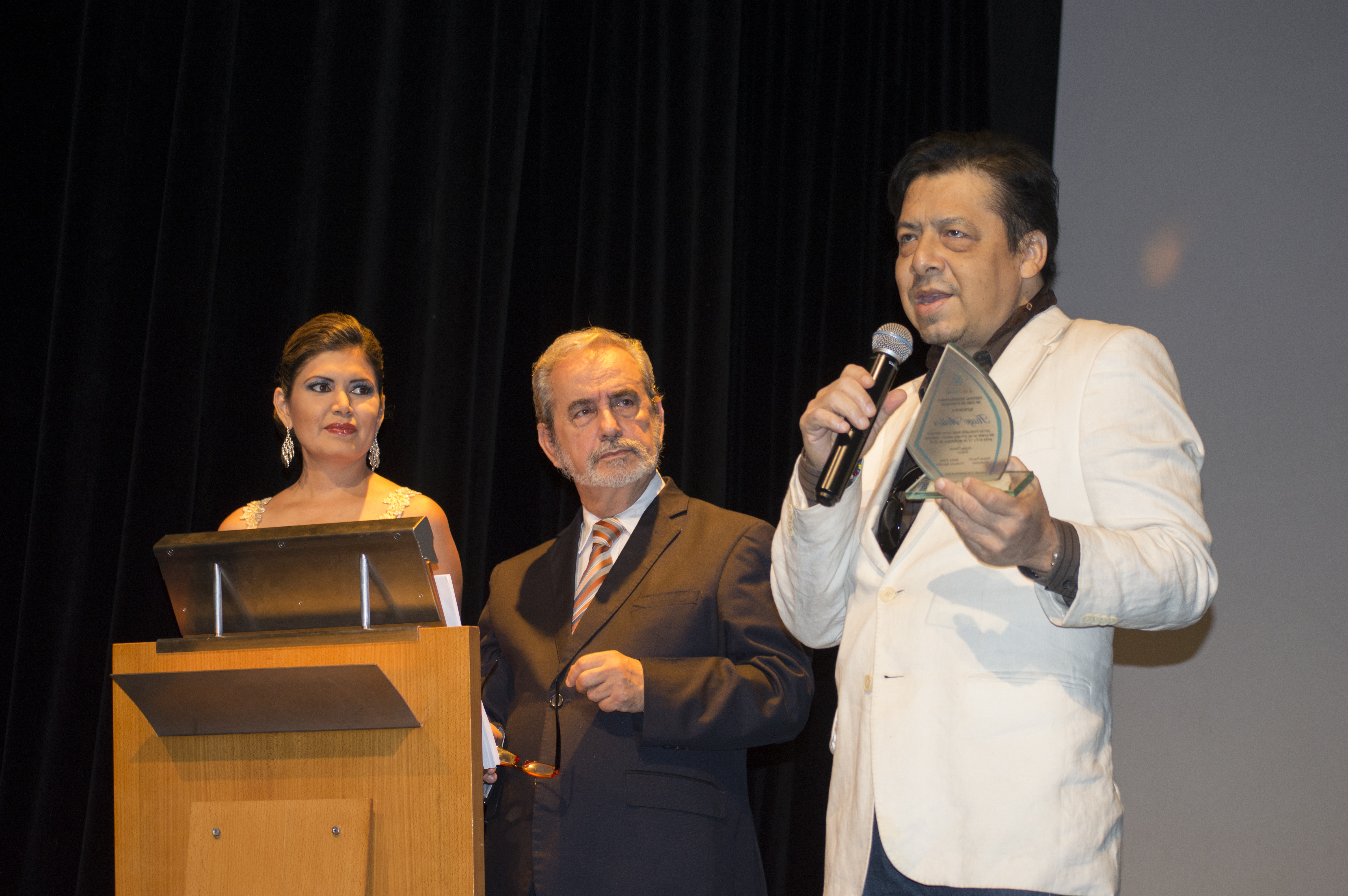 Hugo Avilés recibe un reconocimiento por su labor como juez del primer Festival Internacional de Cine de Guayaquil en 2015, tras él se encuentra como anfitrión Antonio Santos.